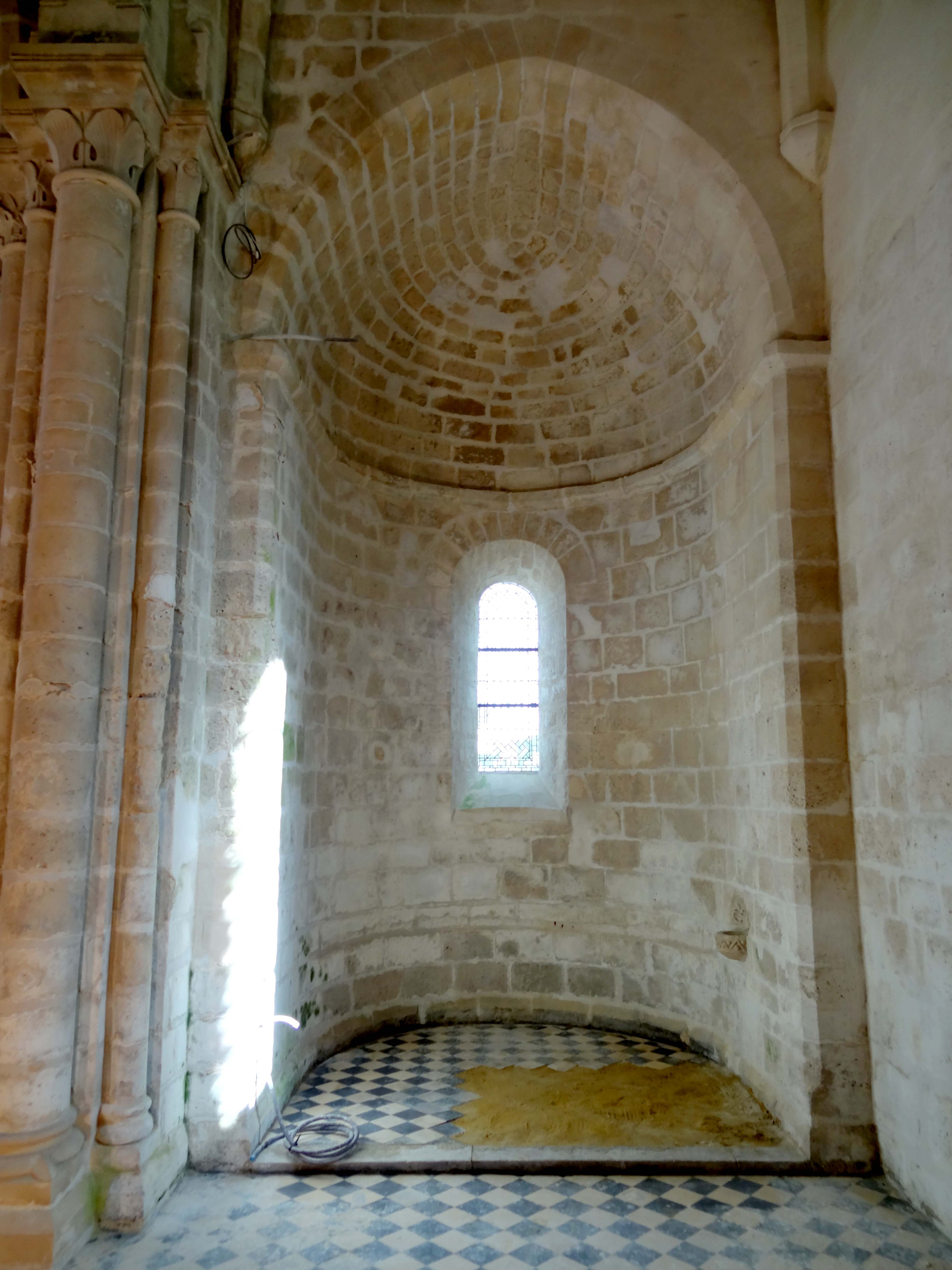 Intérieur de l'église - voir titre.